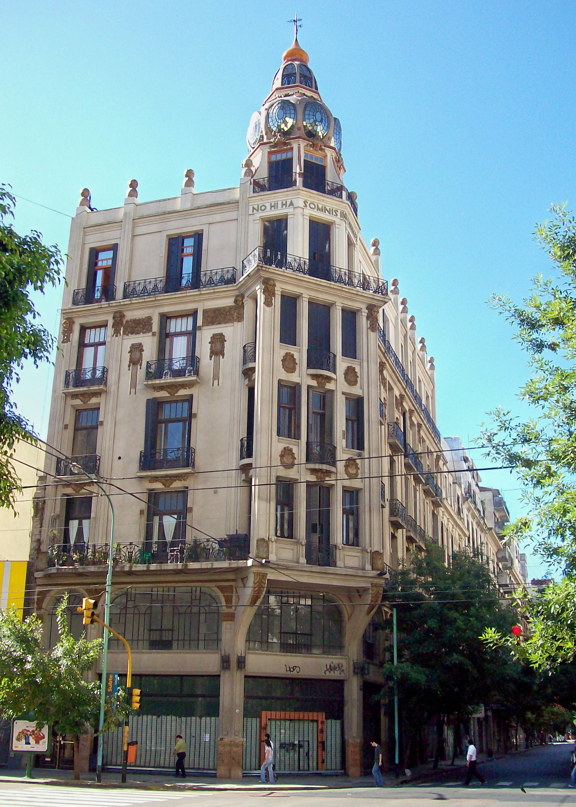 Esquina Noroeste de Avenida Rivadavia y Ayacucho, Buenos. Aires. Argentina. Foto tomada de SE a NO. "No hay sueños imposibles", dice la inscripción en latín que está en la torre.